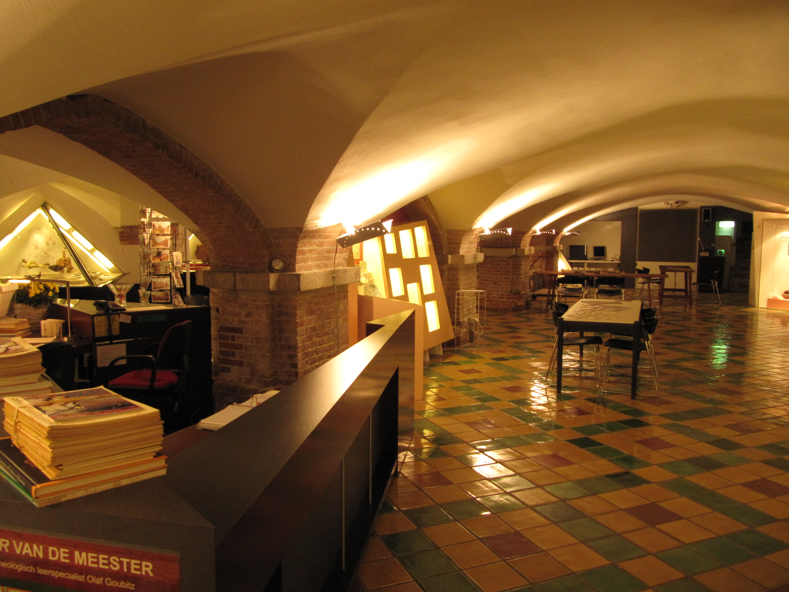 RM19262 Haarlem - Grote Markt 18 (gewelven binnen).jpg